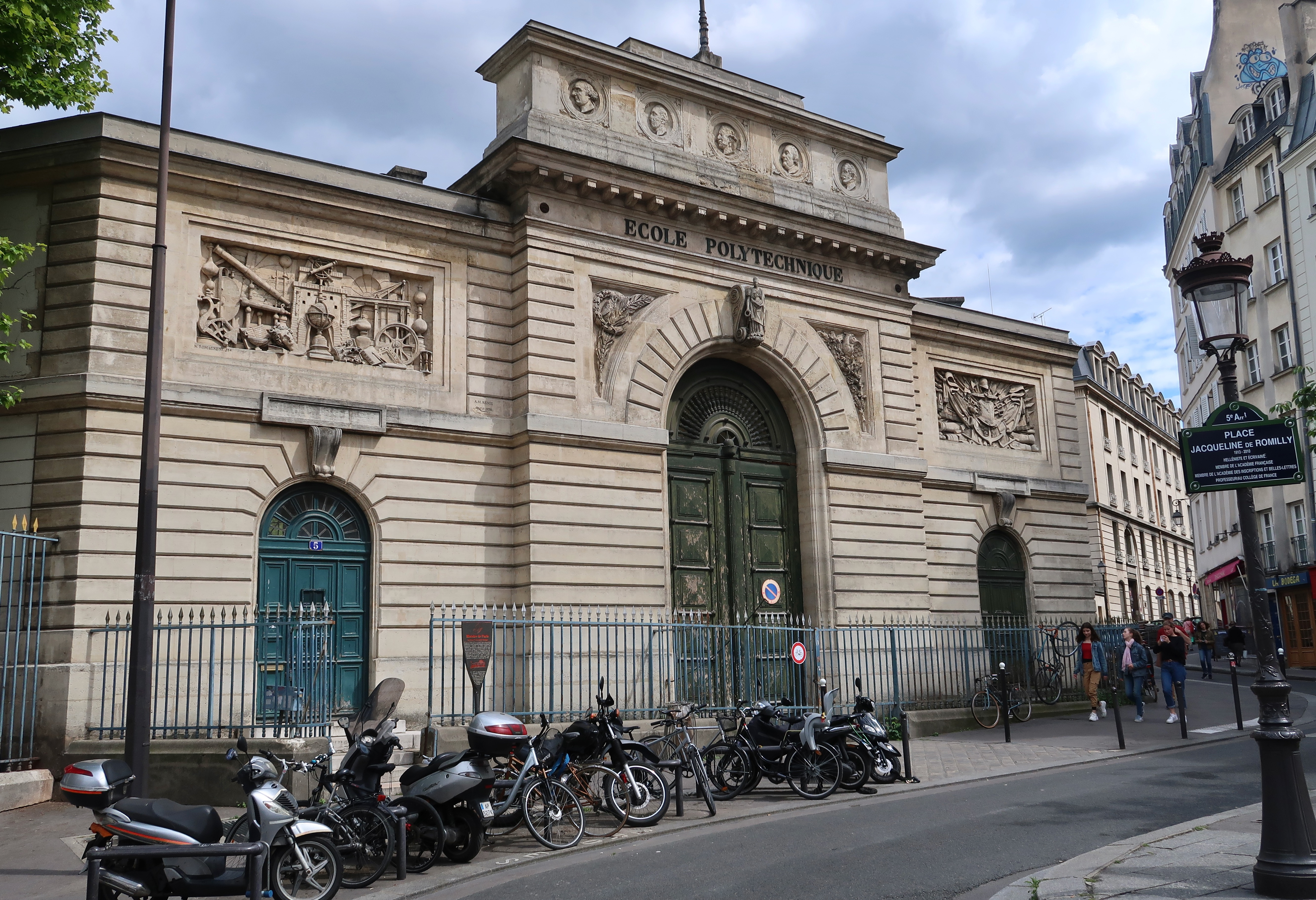 École polytechnique, placette Jacqueline-de-Romilly (Paris, 5e).